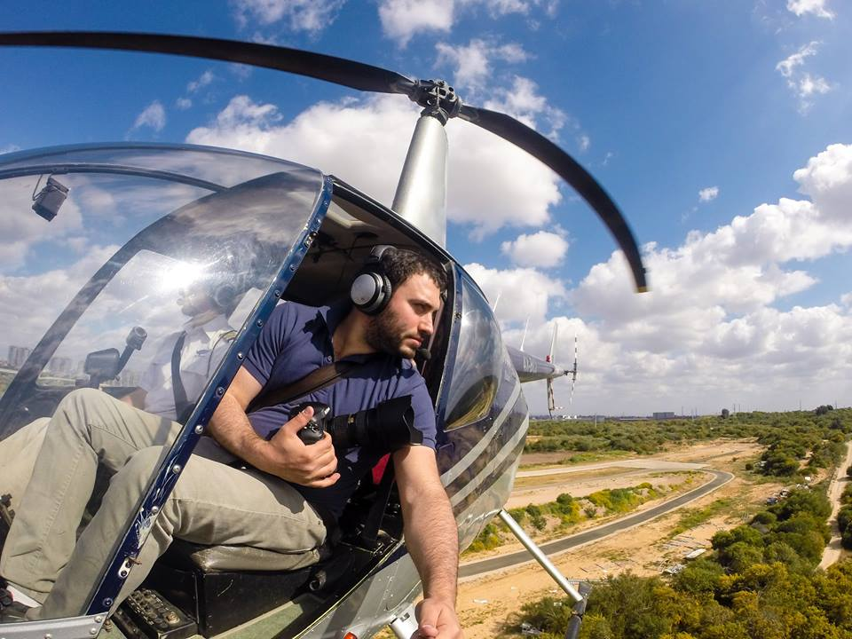 ישראל ברדוגו במהלך טיסת צילום ממסוק רובינזון